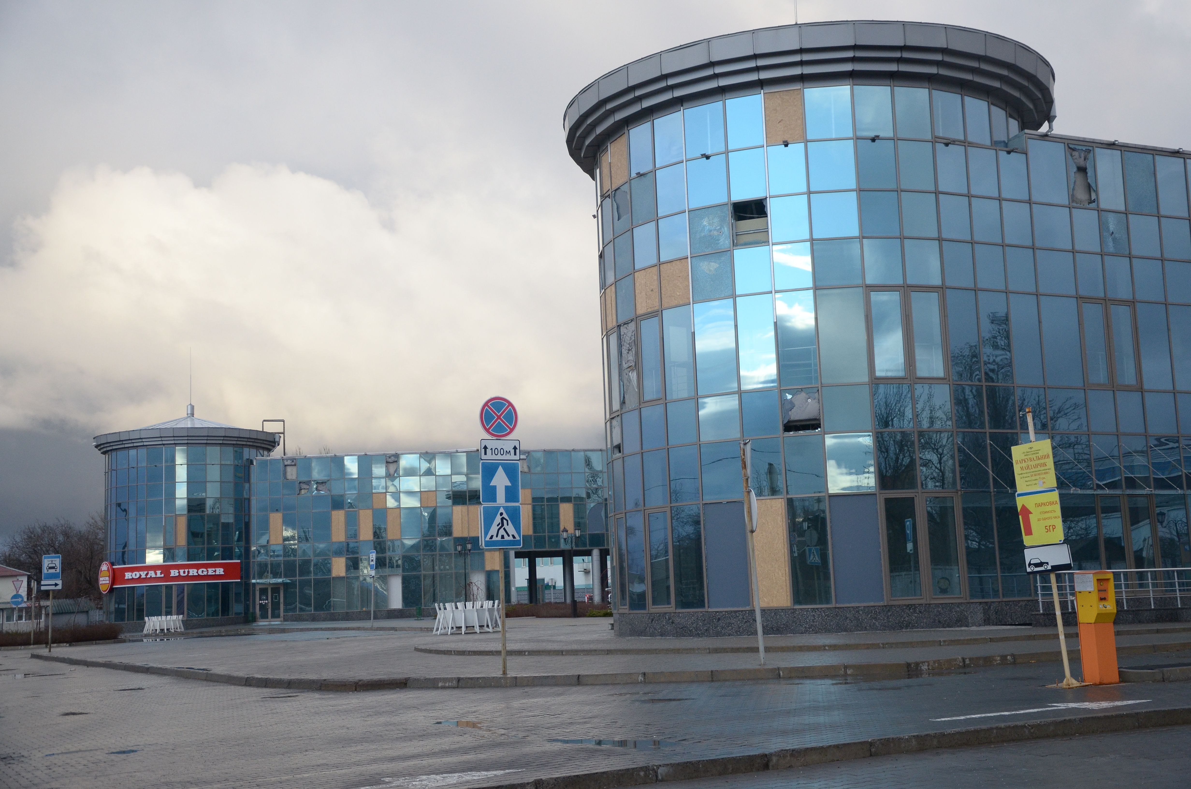 Донецк.